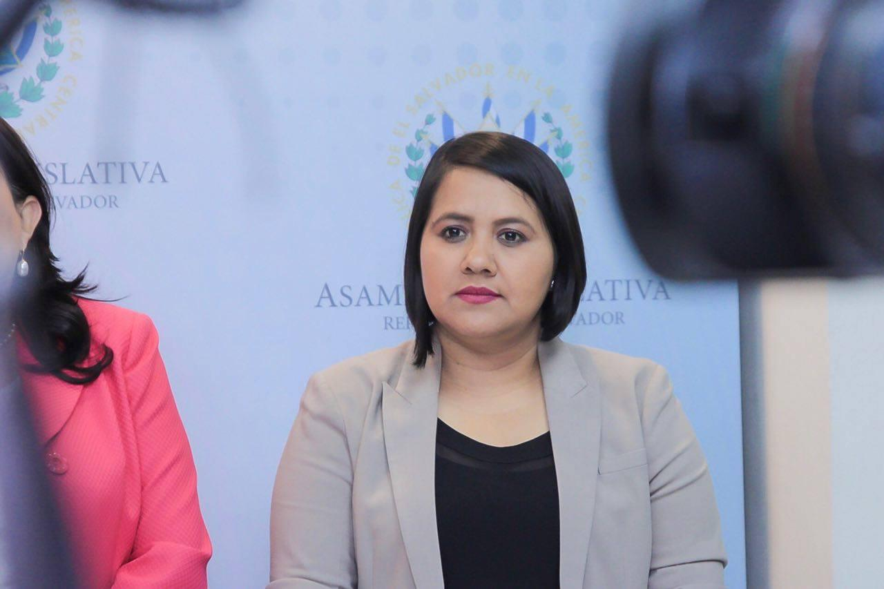 Entrevista de diputada Cristina Cornejo a medios de prensa de El Salvador